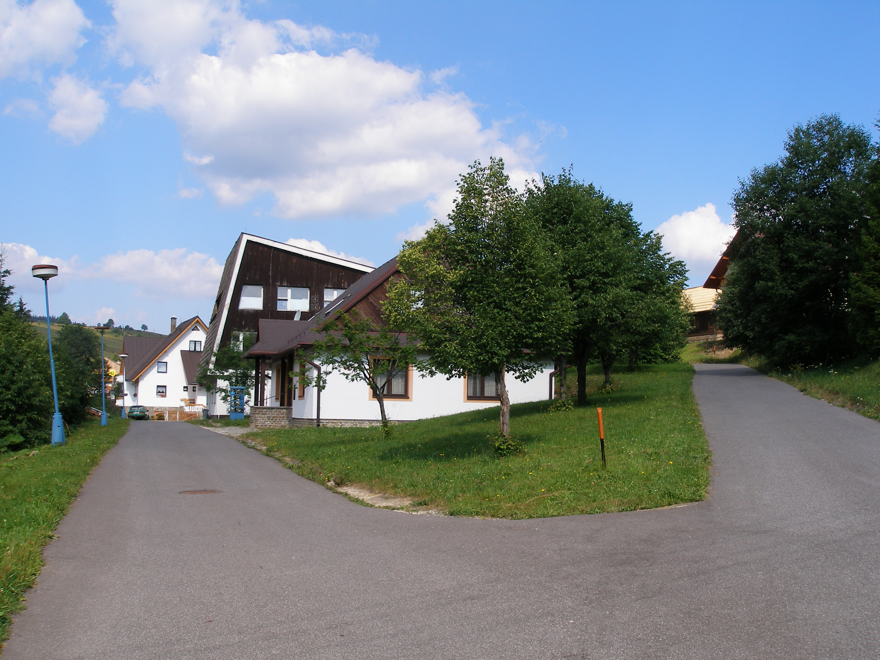 Podtatranská obec Ždiar